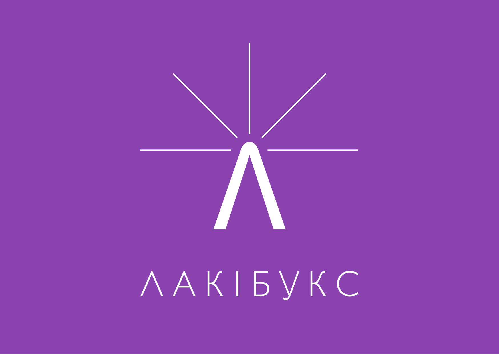 Логотип проекту ЛакіБукс